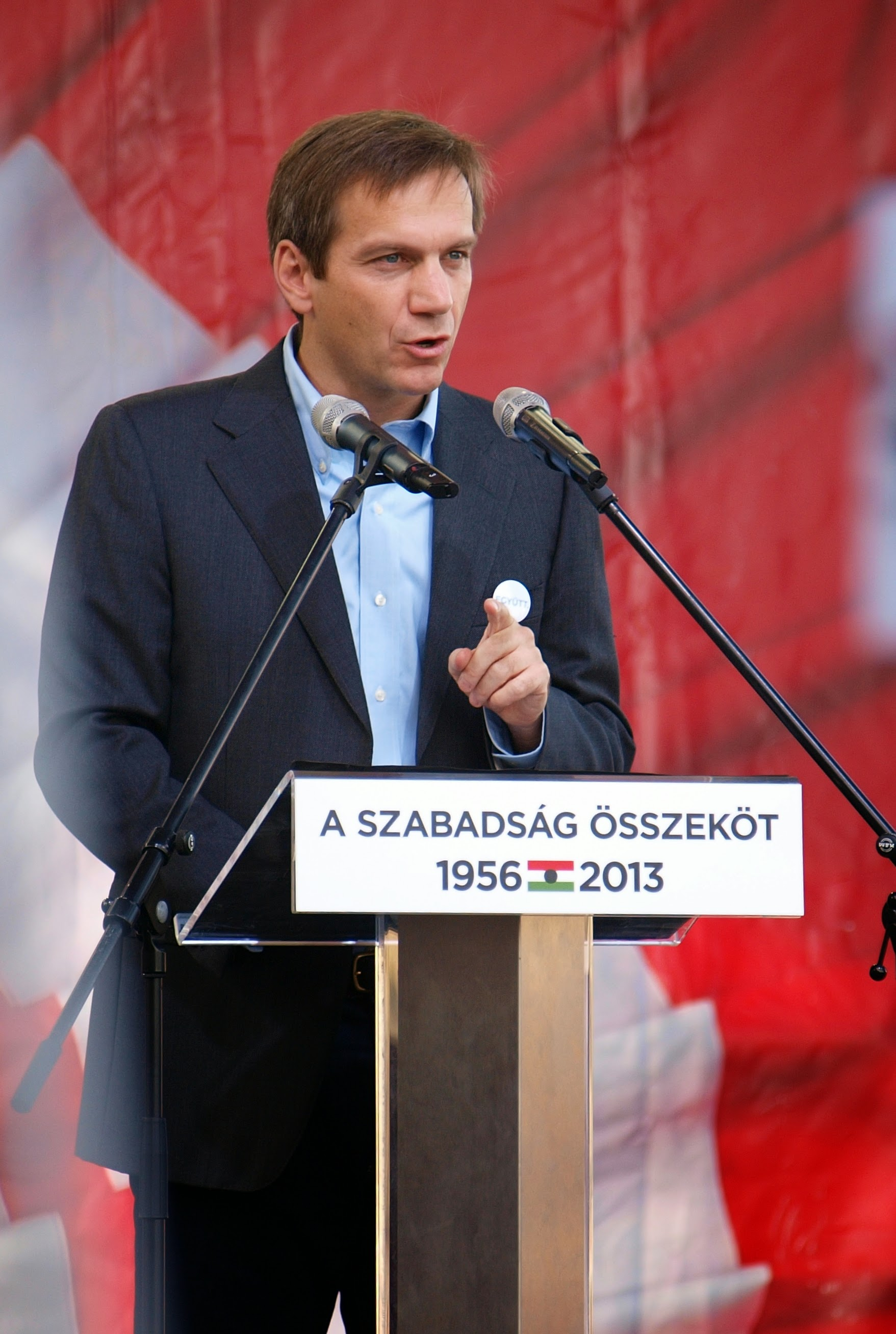 Bajnai Gordon 2013. okt. 23-án